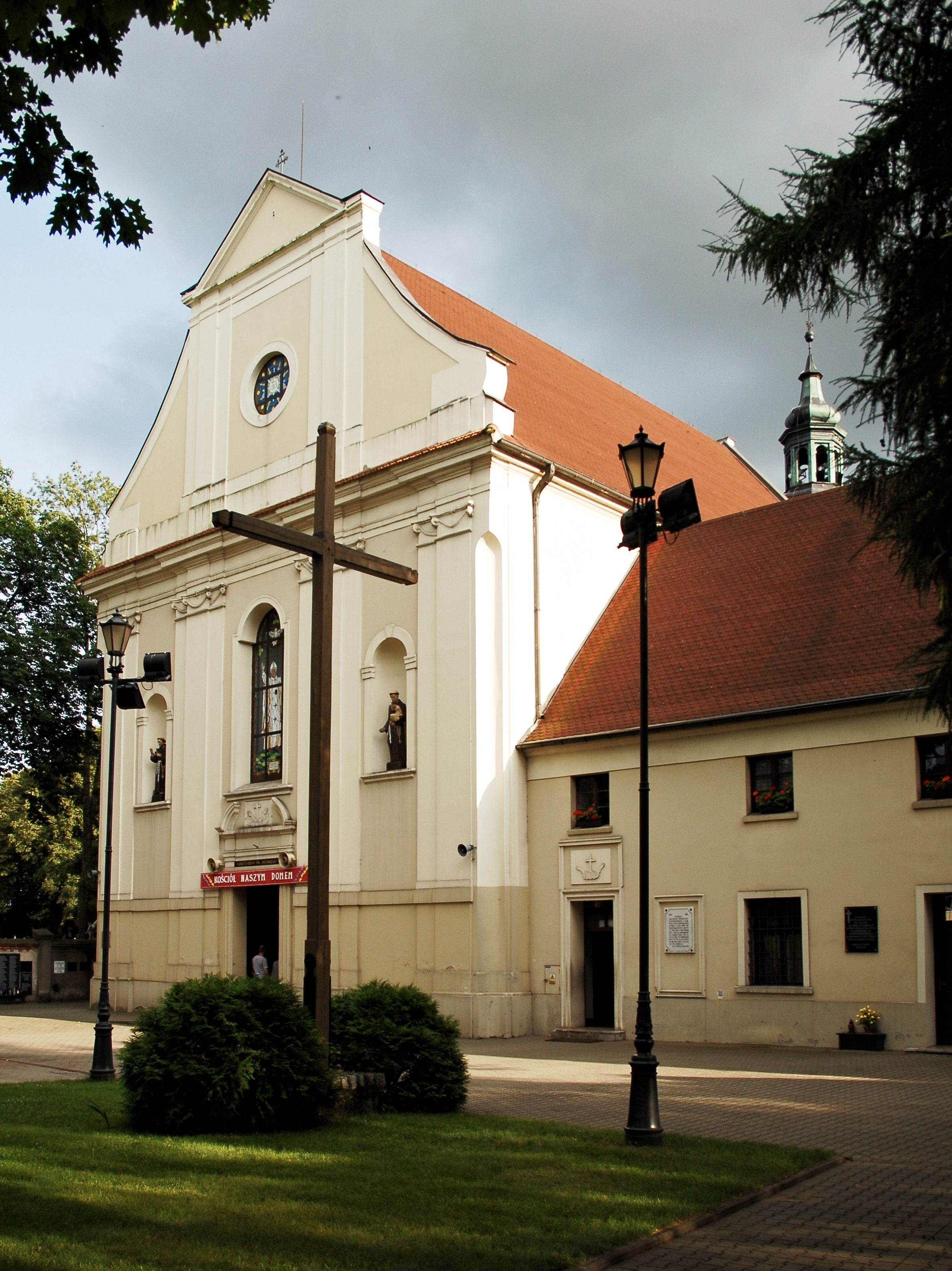 Kościół Niepokalanego Poczęcia Najświętszej Maryi Panny w Brodnicy.